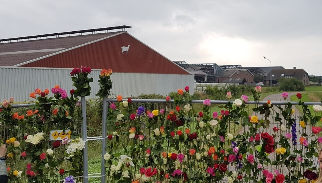 Op 29 juli 2017 hielden dierenliefhebbers en -activisten van verschillende groepen een wake voor de circa 20.000 varkens die twee dagen eerder waren omgekomen bij de stalbrand op boerderij De Knorhof in Erichem. Zij herdachten de dieren en protesteerden tegen dierenleed.